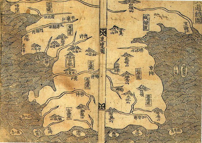 八道総図。1530年発行。